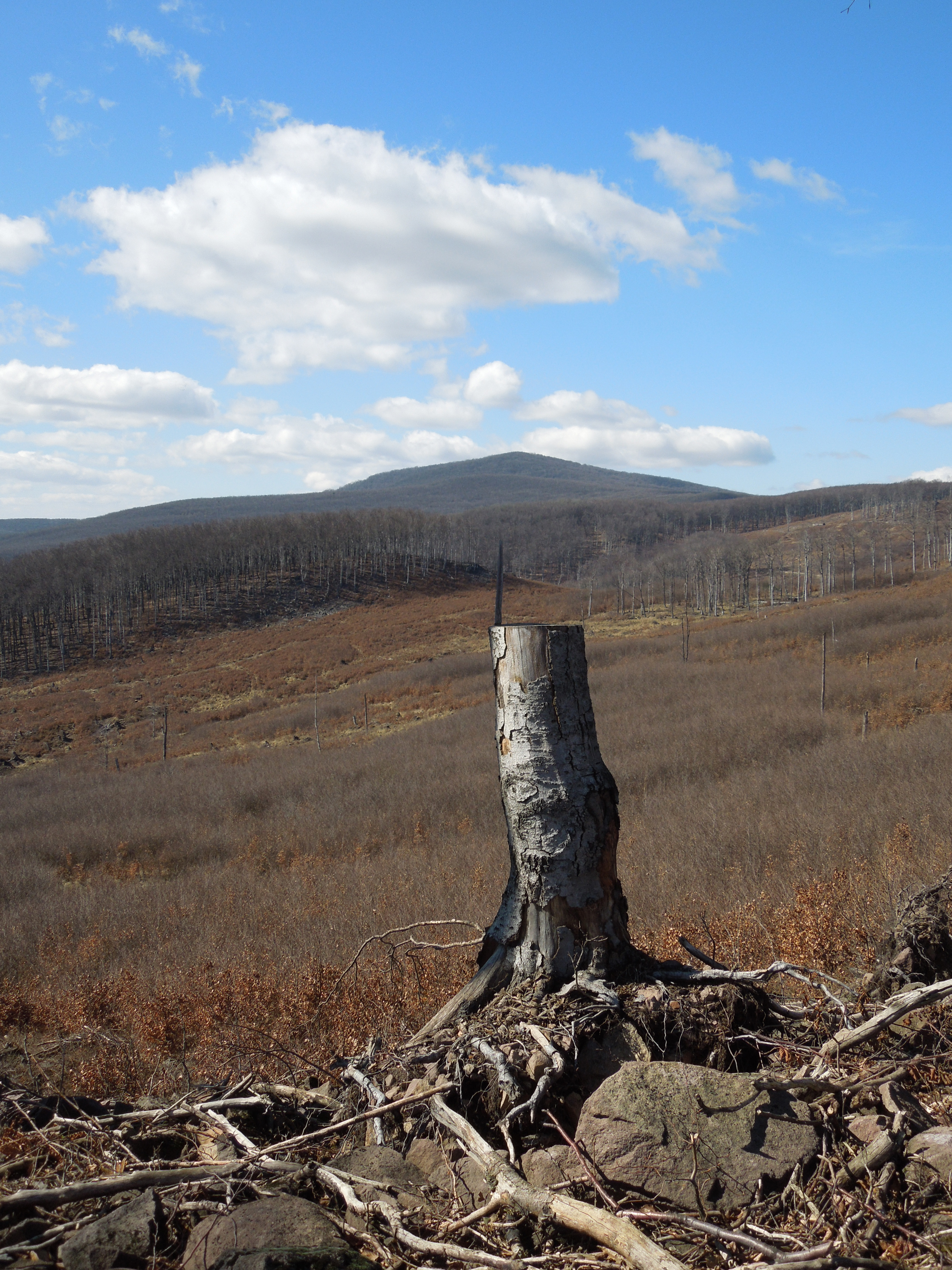 Pohľad na Kyjov z rozsiahleho rúbaniska v okolí vrchu Rakovský kameň